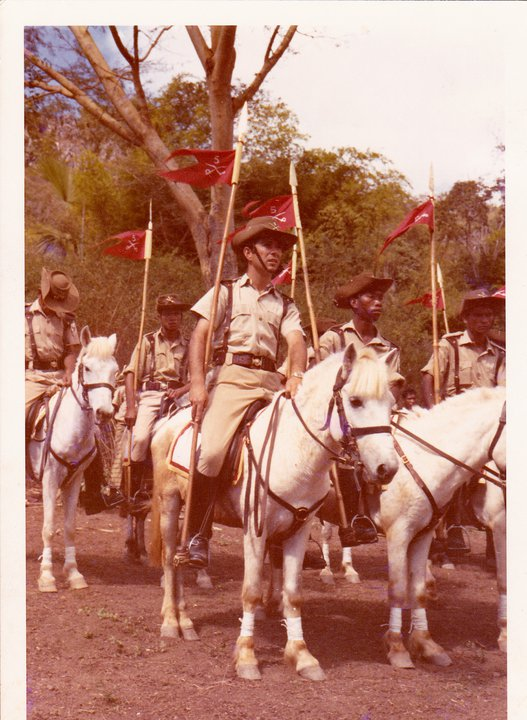 Huato Buicari--Cavaleiros do Esquadrão de Cavalaria 5 de Bobonaqro